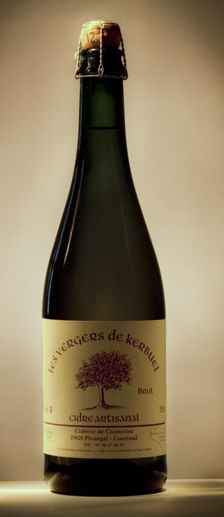 Cidre artisinal de Bretagne